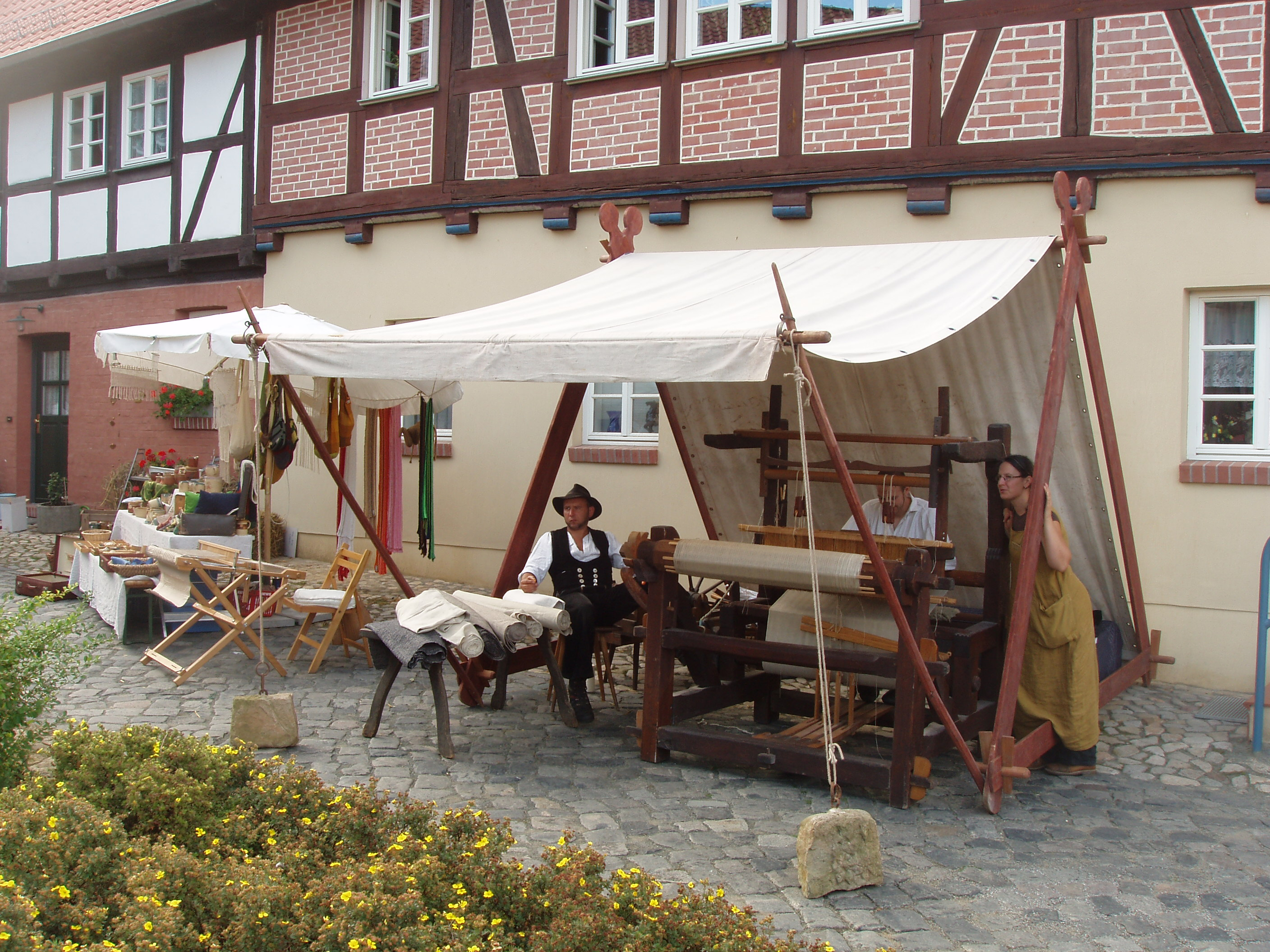 Markt auf dem Wegenerischen Hof während der 1000-Jahrfeier in Börnecke